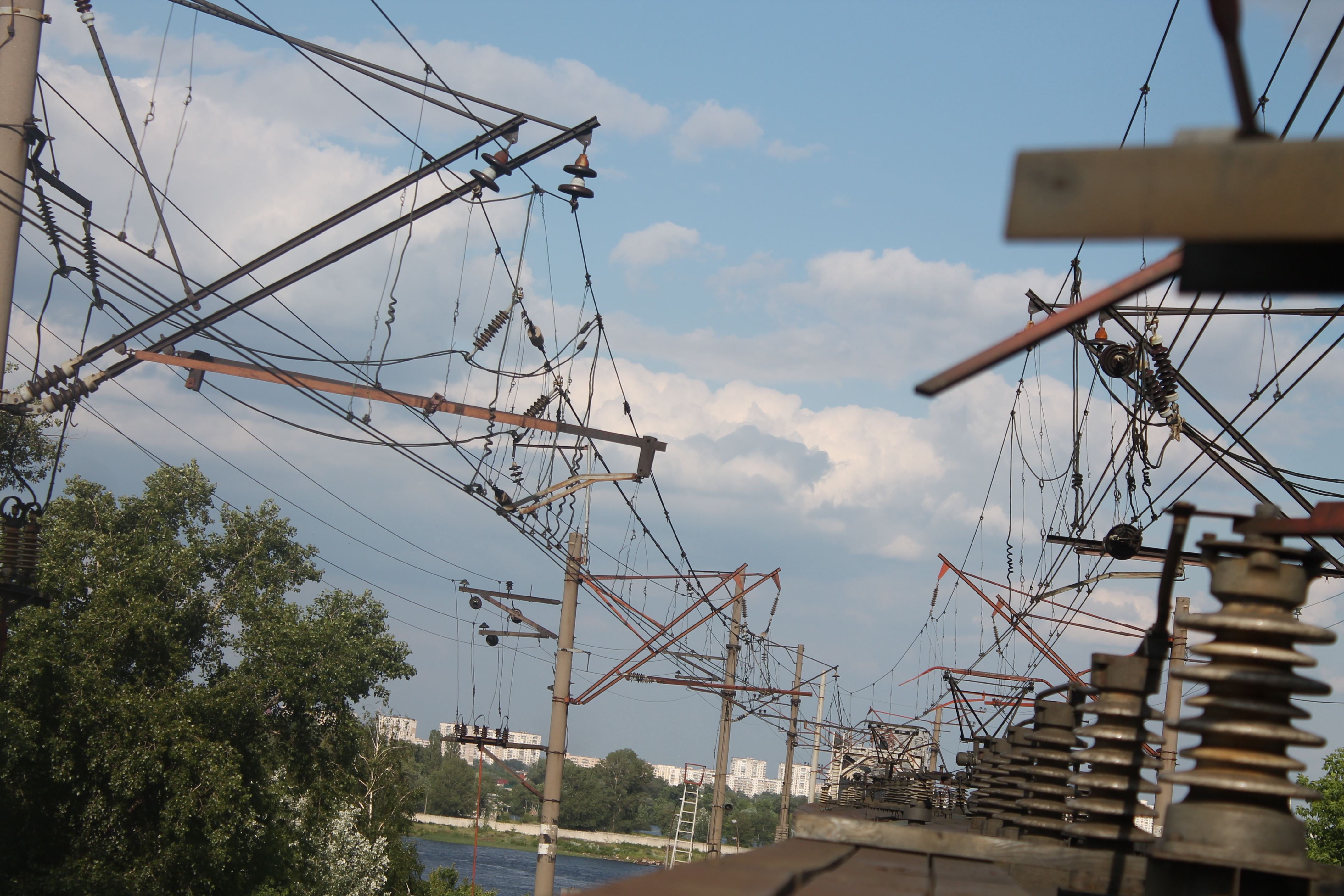 Руфрайд міського електропоїзда